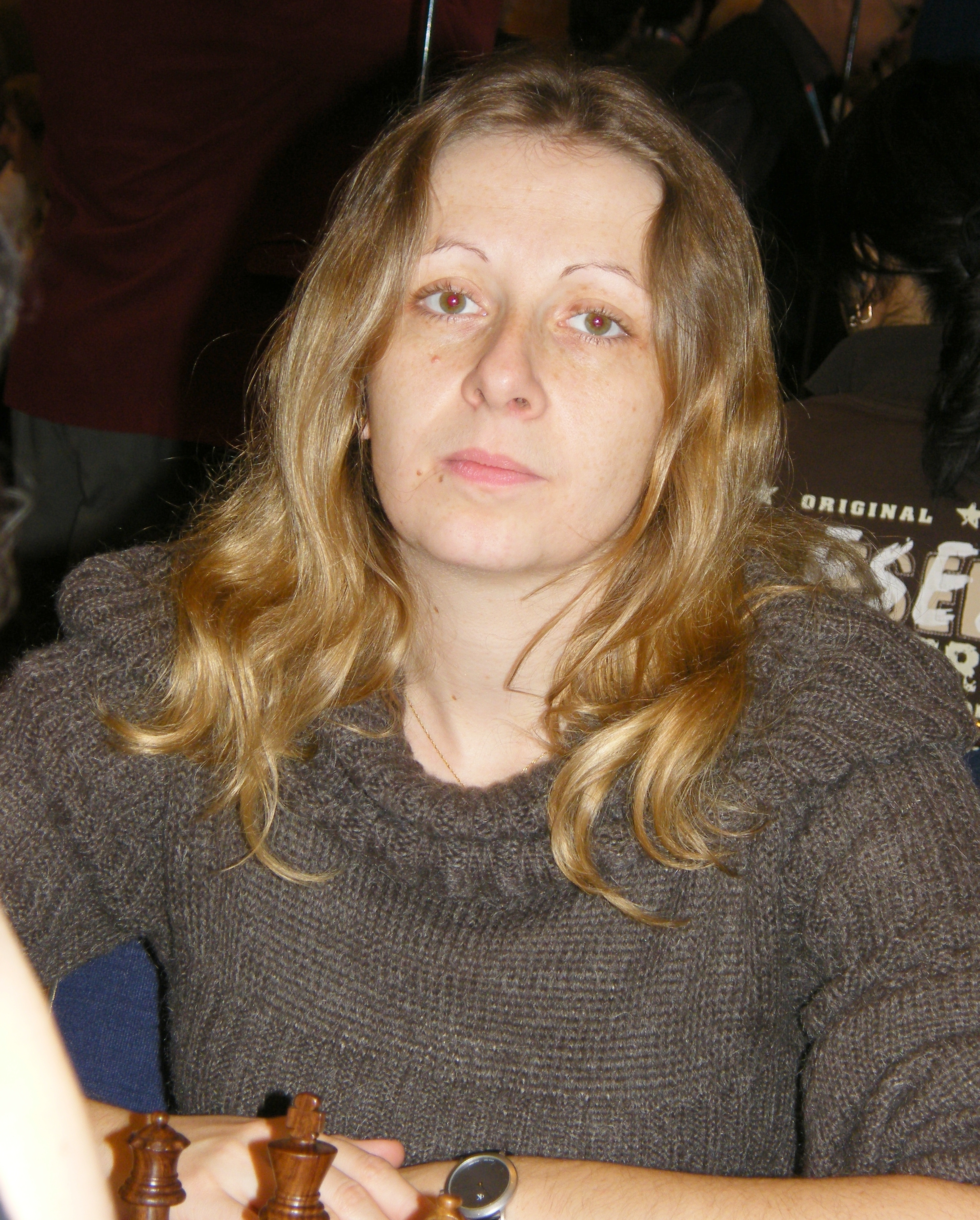 Monika Socko bei der 38. Schacholympiade in Dresden 2008